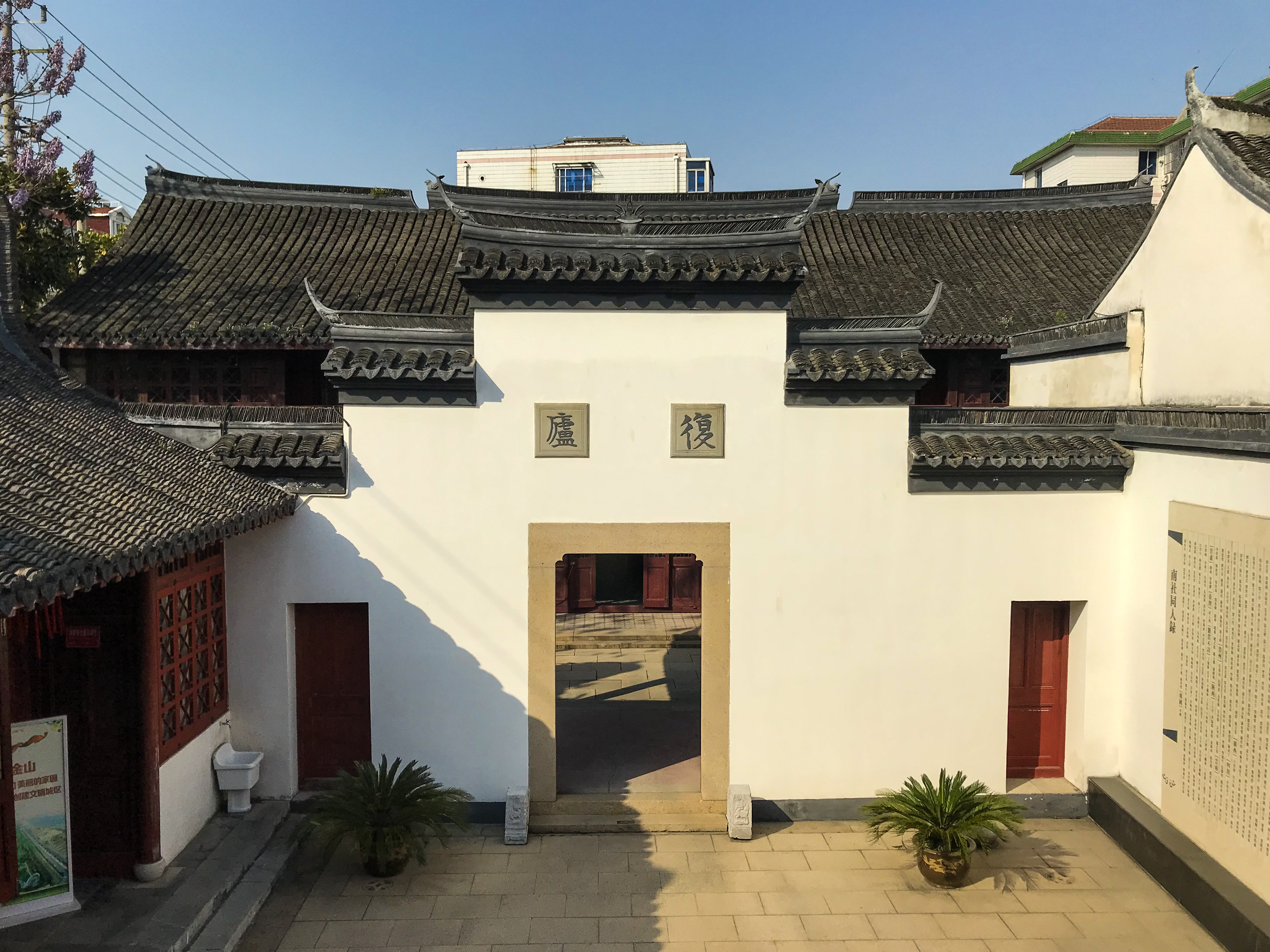 中文（中国大陆）: 姚光故居 张堰镇新华中路139号 1891年